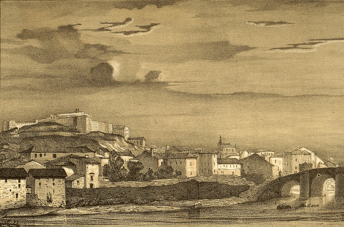 Guerreros carlistas en Miranda de Ebro